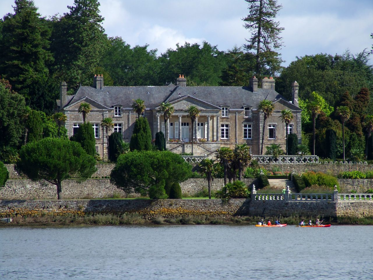 Le chateau de Lanniron sur l'Odet à Quimper (France)